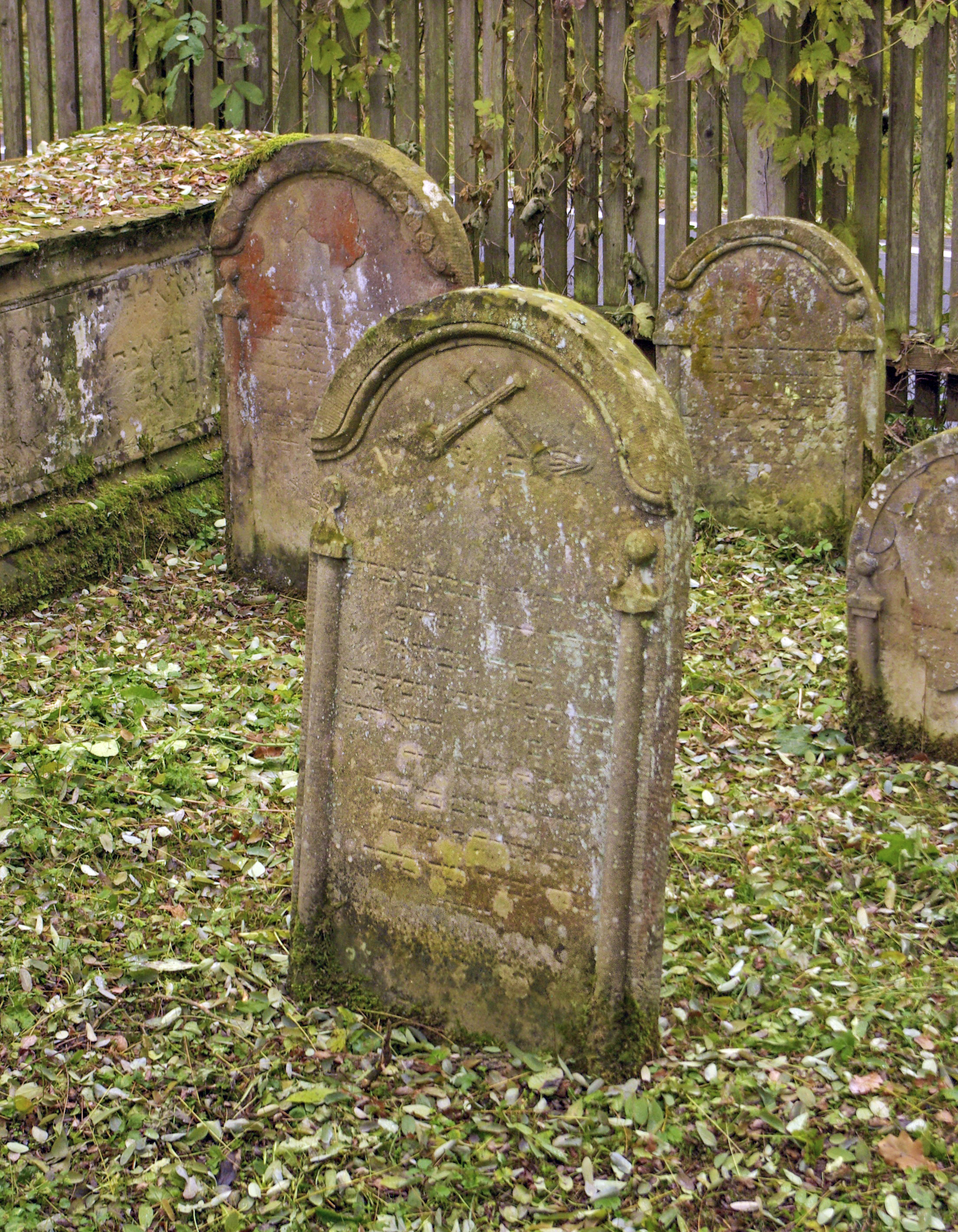 Jüdischer Friedhof in Walsdorf (Oberfranken).